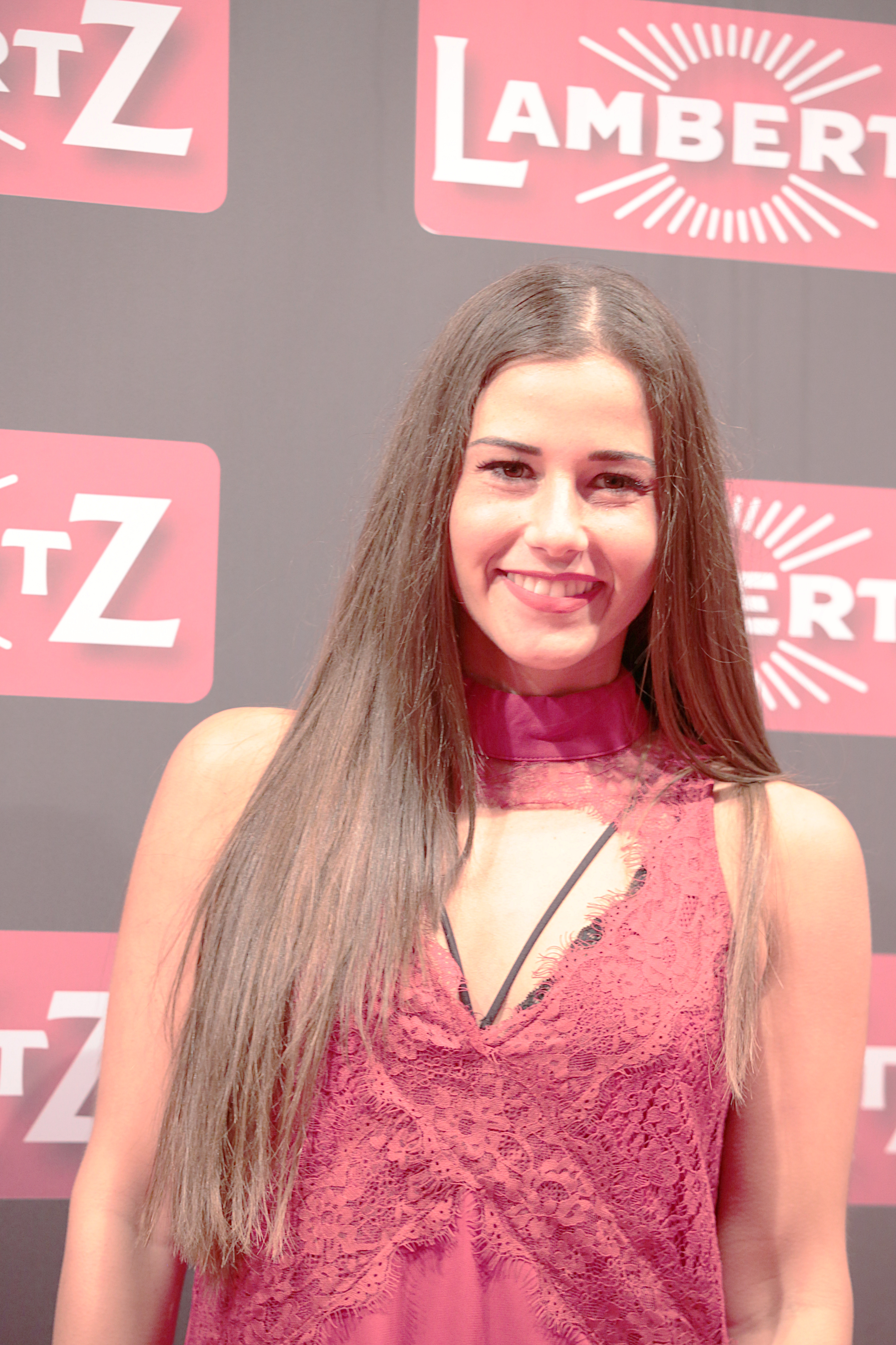 Sarah Lombardi bei der Lambertz Monday Night 2018.